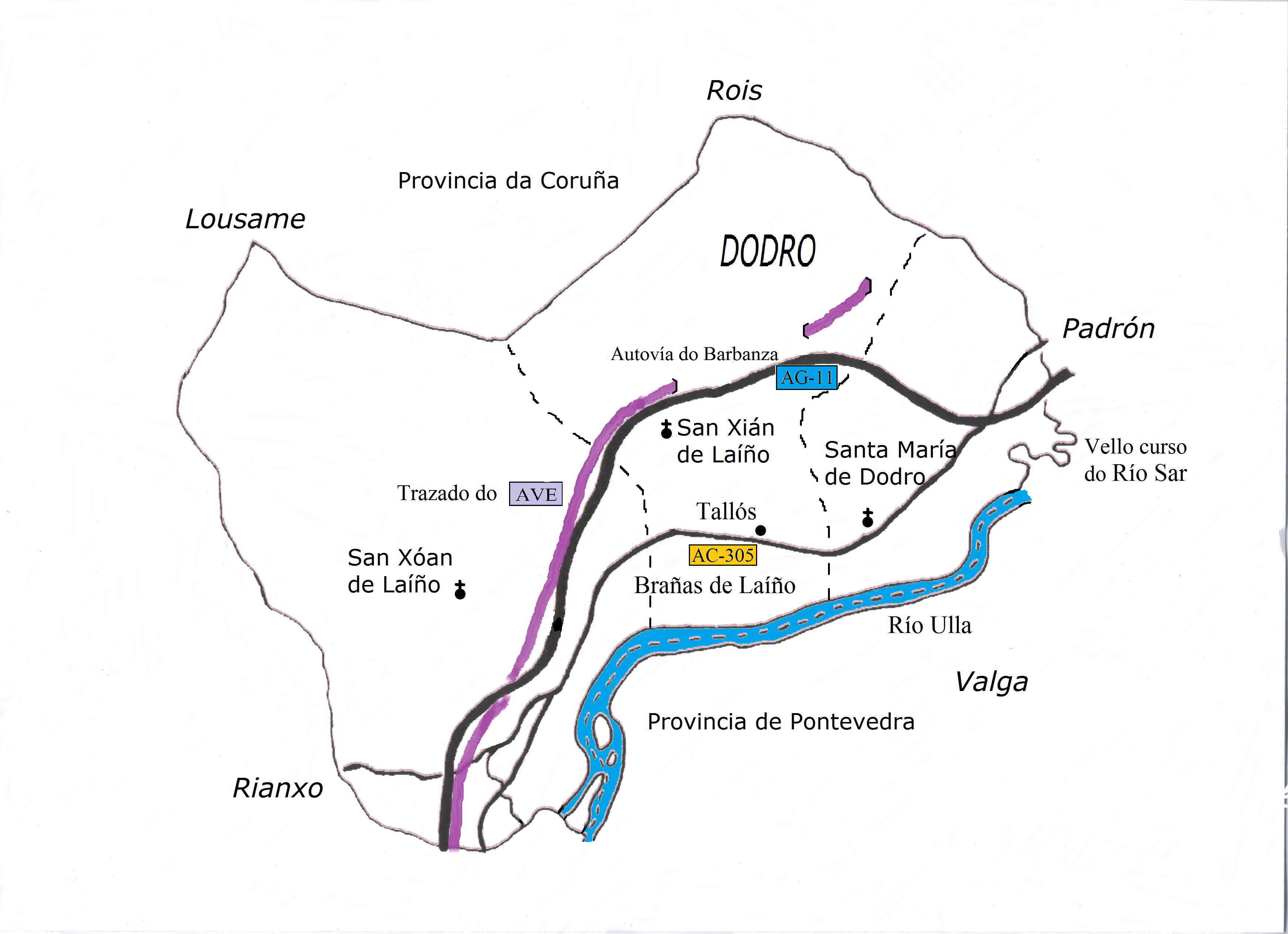 Plano das parroquias de Dodro coas principais vías de comunicación que atravesan o concello.